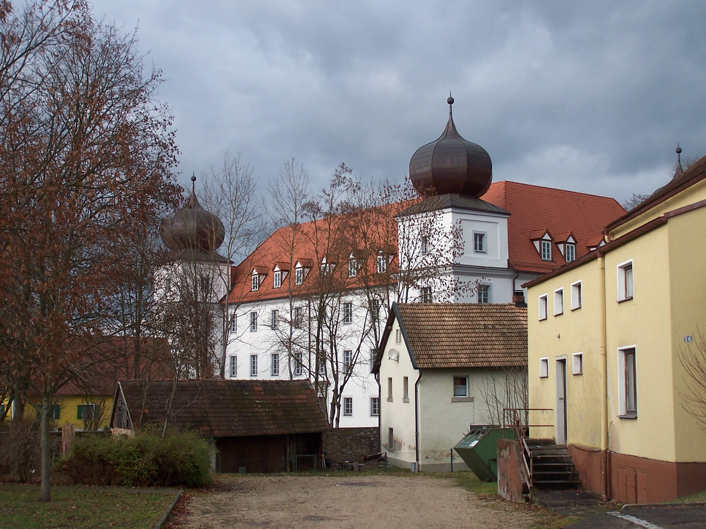 Maxhütte-Haidhof, Pirkensee, Asamweg 4. Schloss Pirkensee, nach Norden offene Dreiflügelanlage mit vier Ecktürmen, um 1734; Schlosskapelle St. Anna, mit Ausstattung, um 1735; Reste einer getreppten Wallanlage in ovalem Grundriß, mittelalterlich.